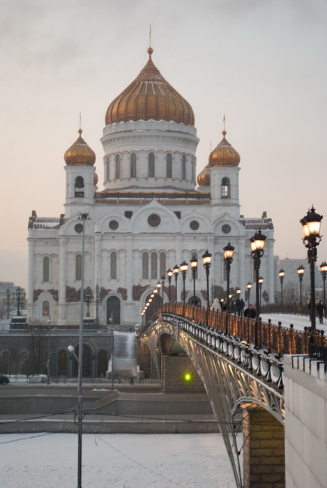 февраль, 2012